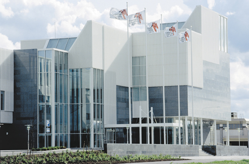 Mäntsälän kunnantalo